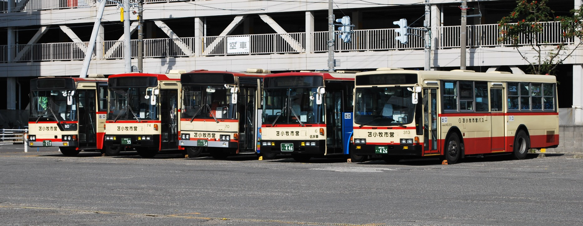 苫小牧市営バスの車両 北海道苫小牧市バスターミナル近隣の公道上から撮影